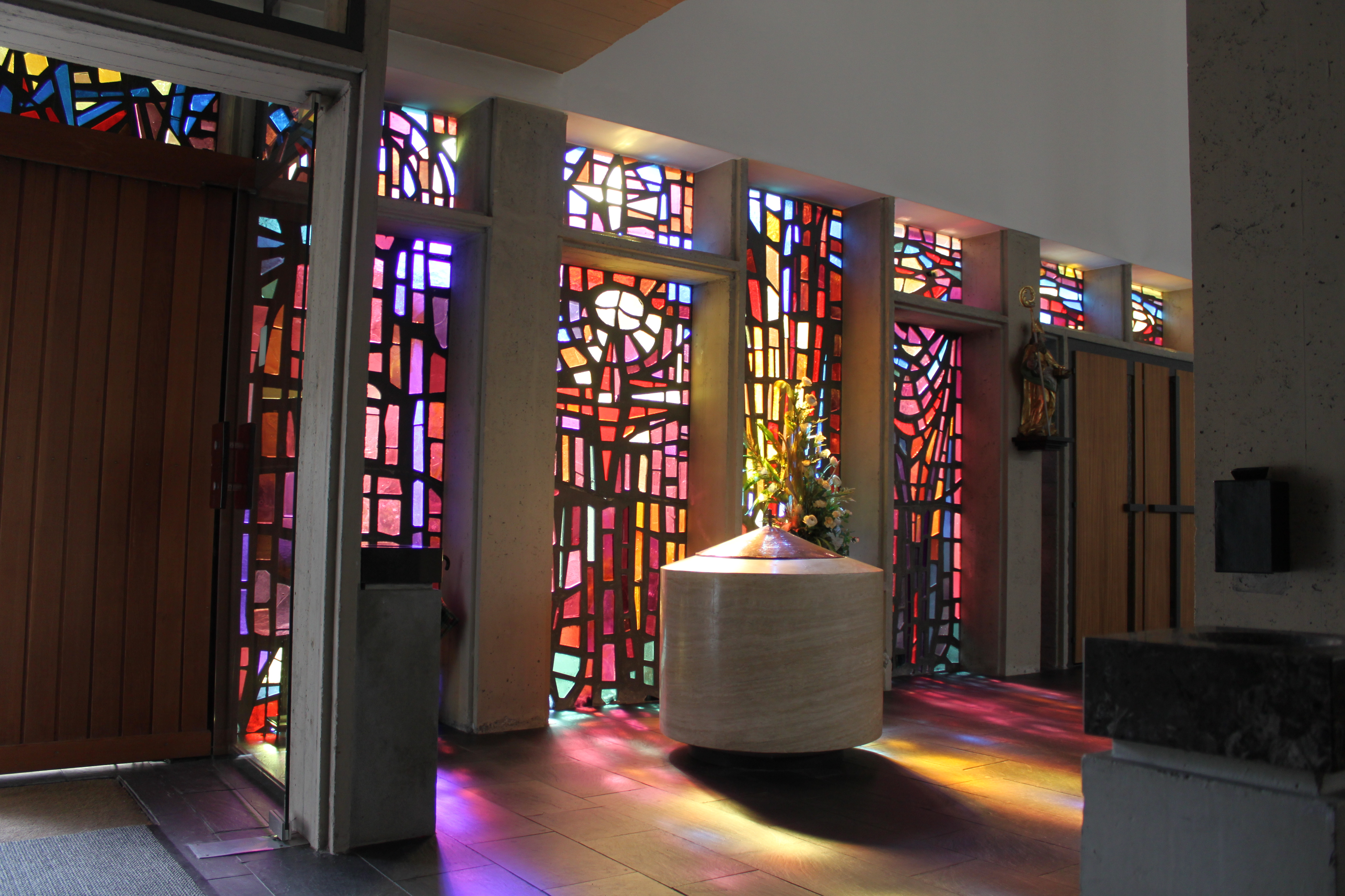 Kath. Pfarrexpositurkirche hl. Josef in Gantschier